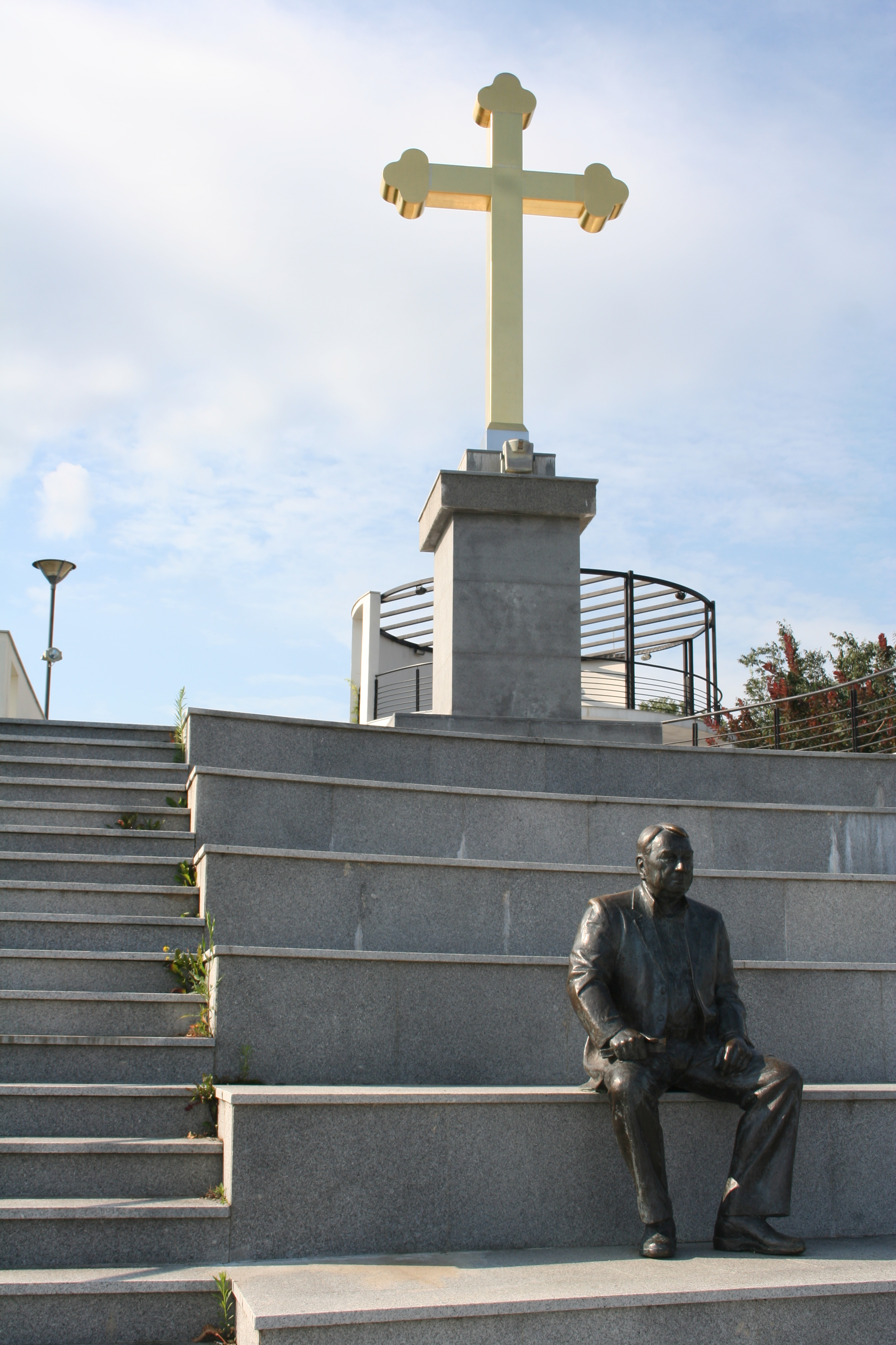 Vidikovac Sremski Karlovci